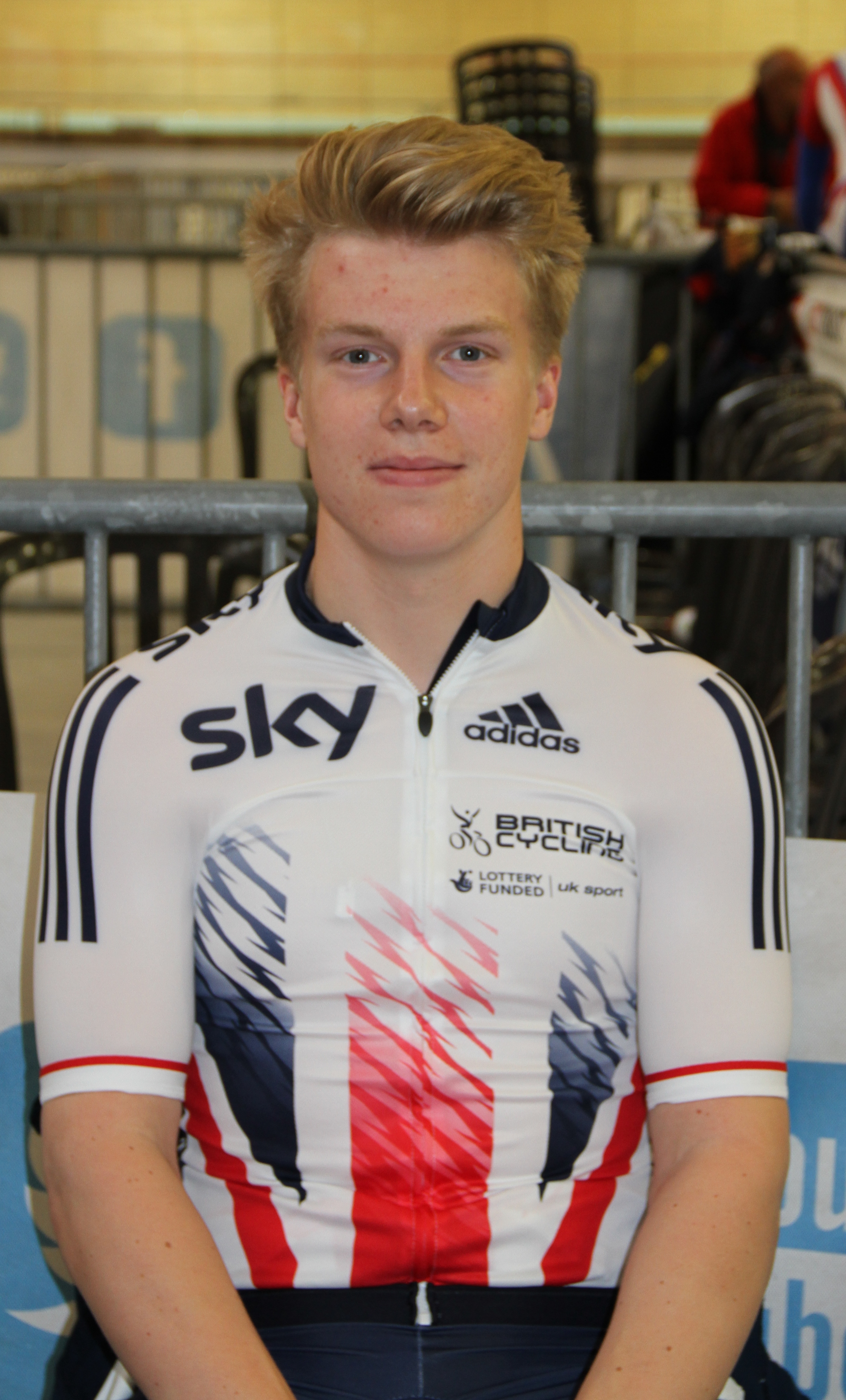 Matthew Gibson, britischer Radsportler The making of this document was supported by the Community-Budget of Wikimedia Germany.